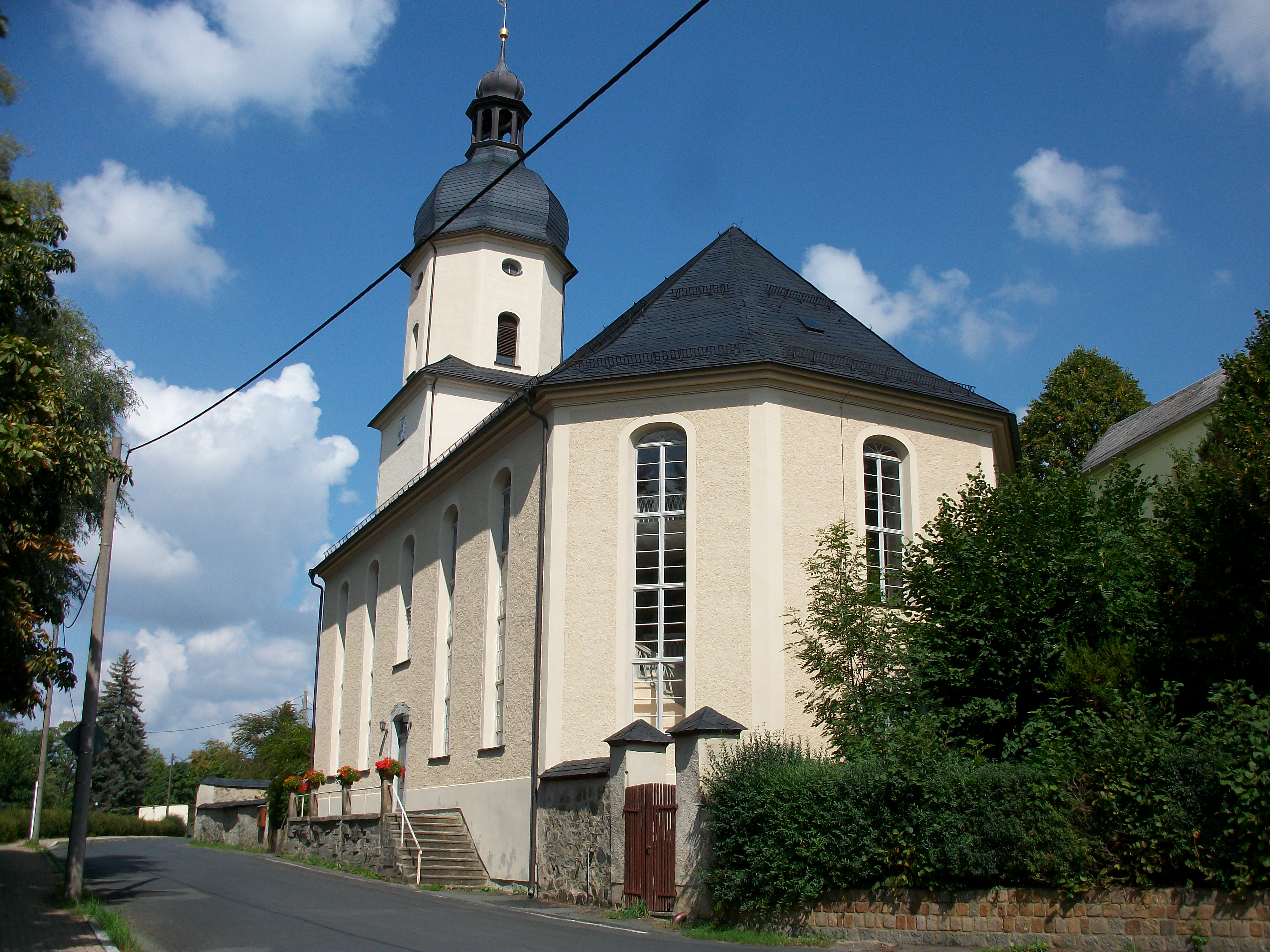 Kirche Geilsdorf